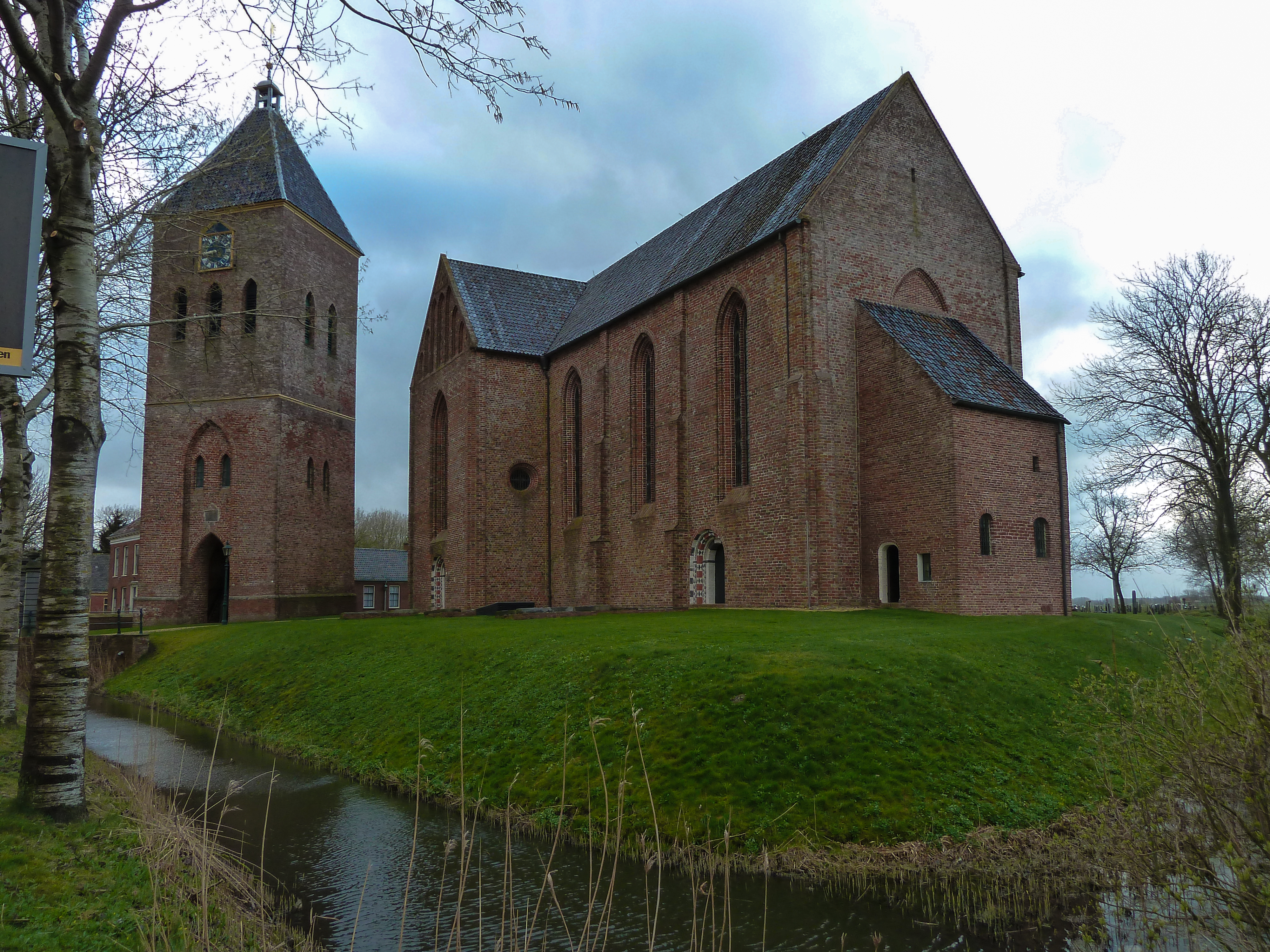 Jacobuskerk in Zeerijp vanuit het westen gezien.